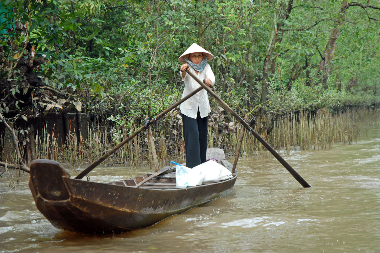 Un arroyo est un petit canal permettant de circuler dans le delta entre les différents bras du Mékong. L'arroyo photographié se trouve dans la région de Cai Be. Les arbres tout autour sont des palétuviers. Article de Wikipedia sur les palétuviers